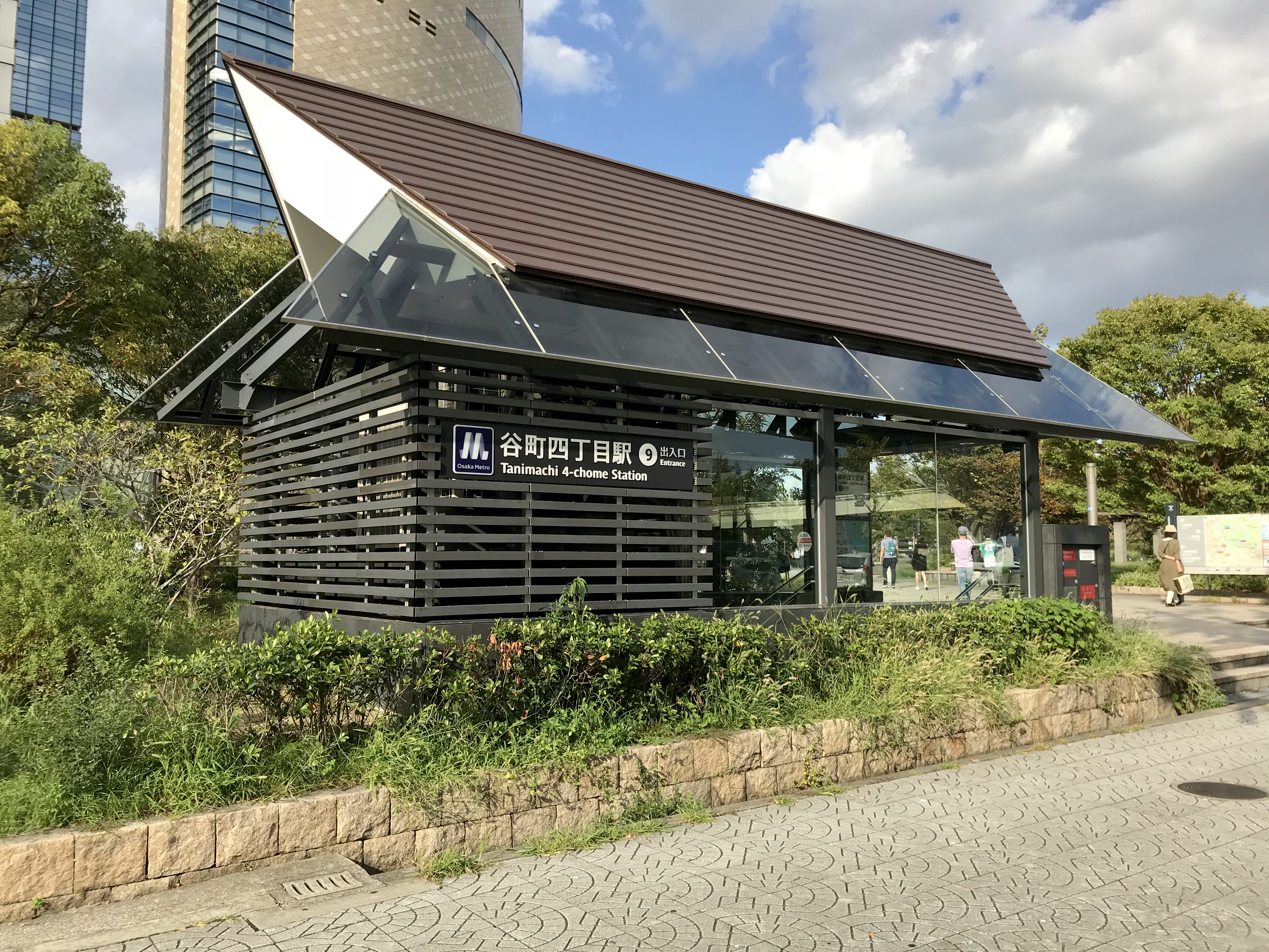 Osaka Metro谷町四丁目駅9番出入口